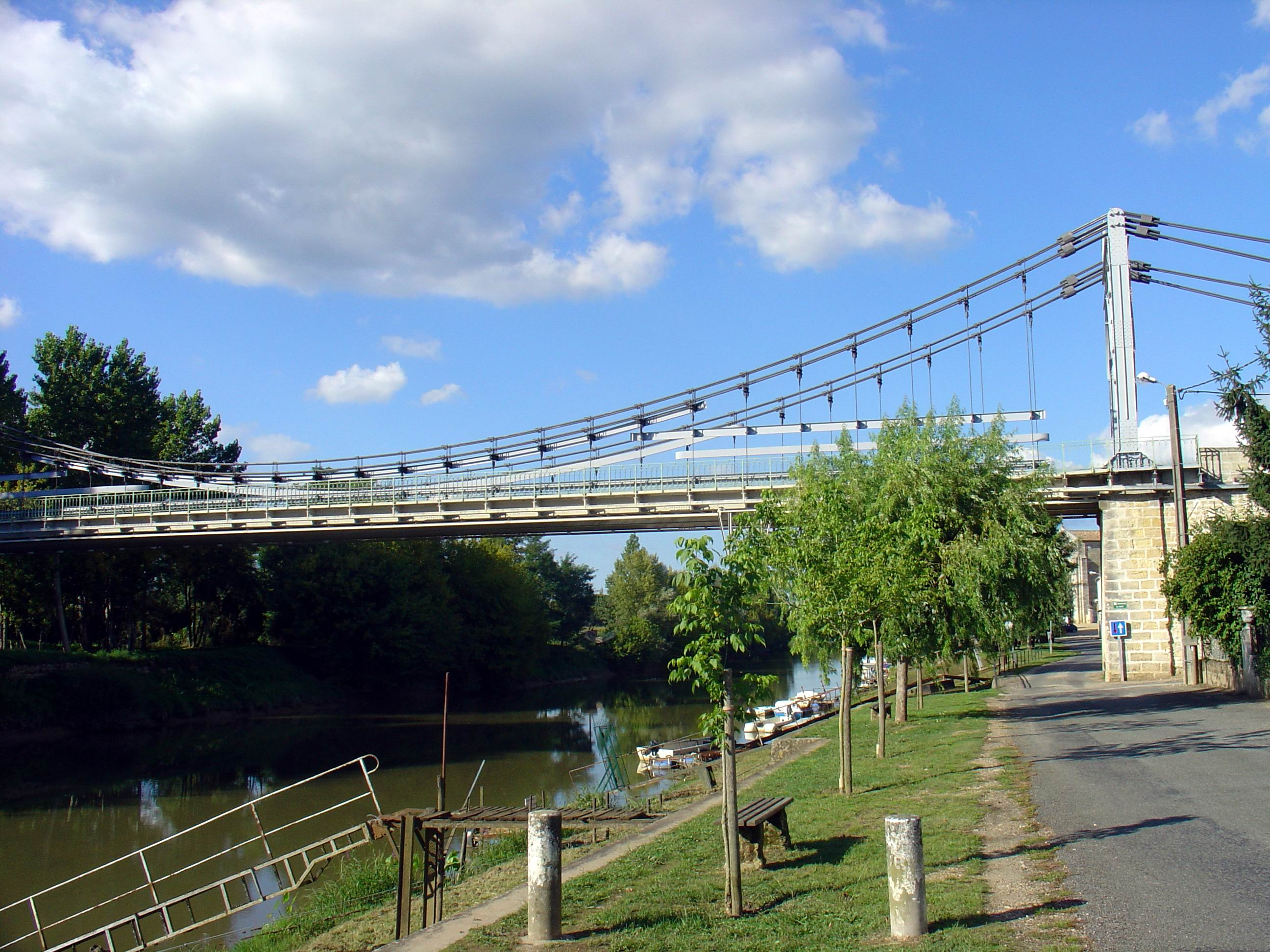 Pont suspendu de Saint-Denis-de-Pile, Gironde, France Septembre 2006 Michel Buze